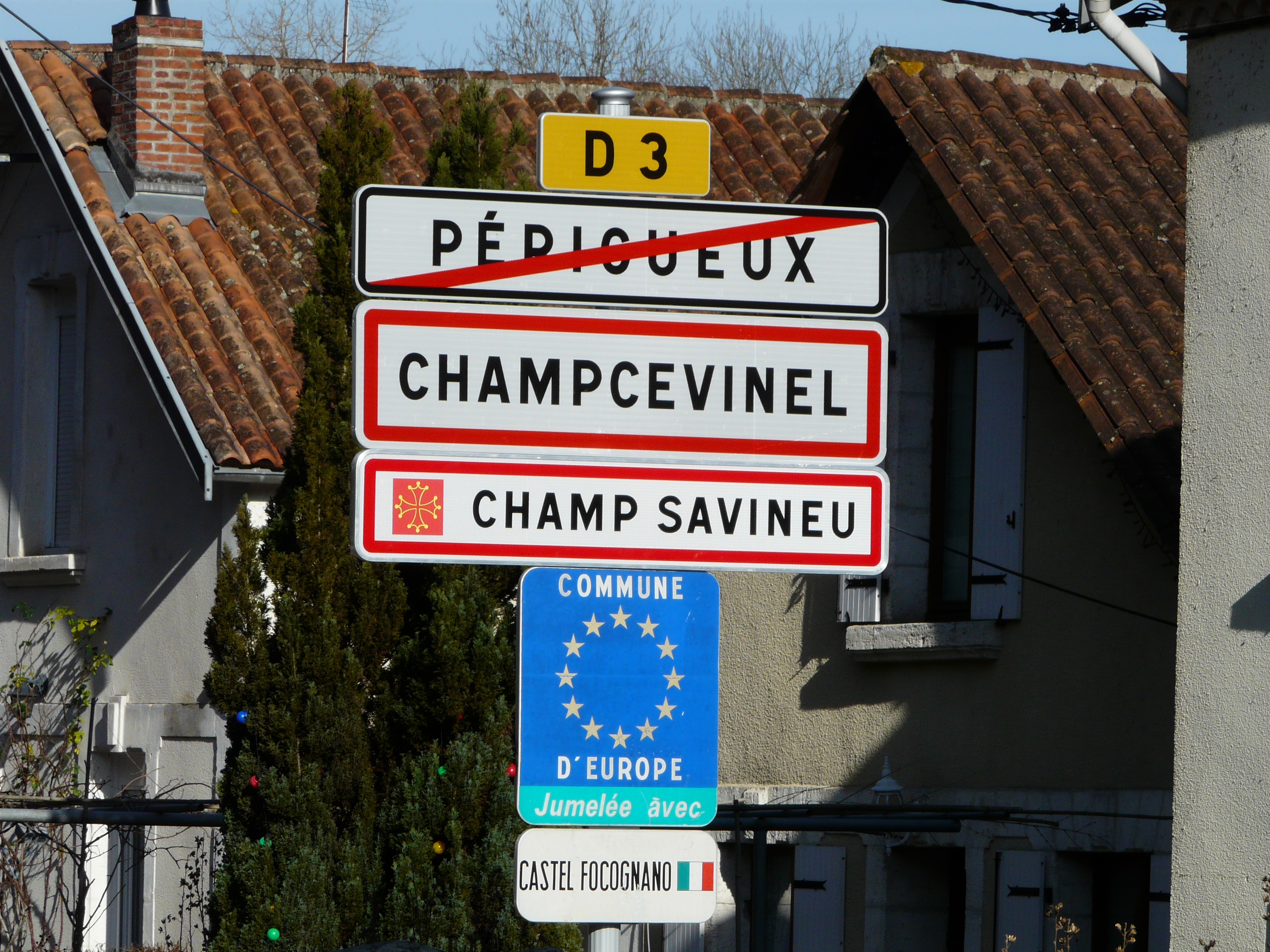 Panneau d'entrée sur la commune de Champcevinel sur la route d'Agonac, route départementale 3, Dordogne, France.